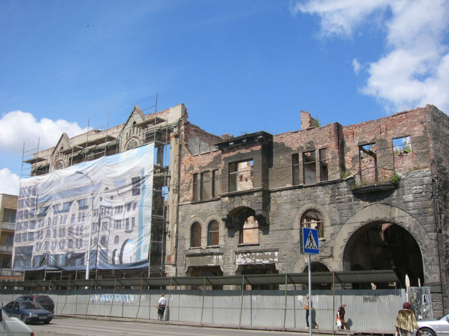 Старое здание на ул. Фрунзе в Калининграде